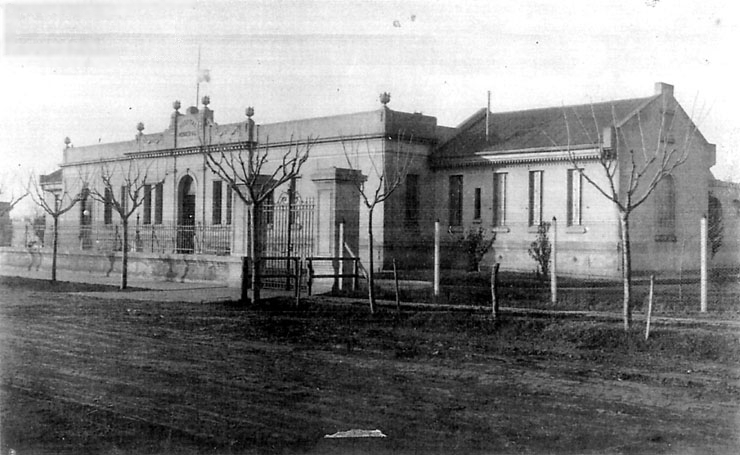 Municipal hospital around 1930, Merlo Partido, Buenos Aires Province.